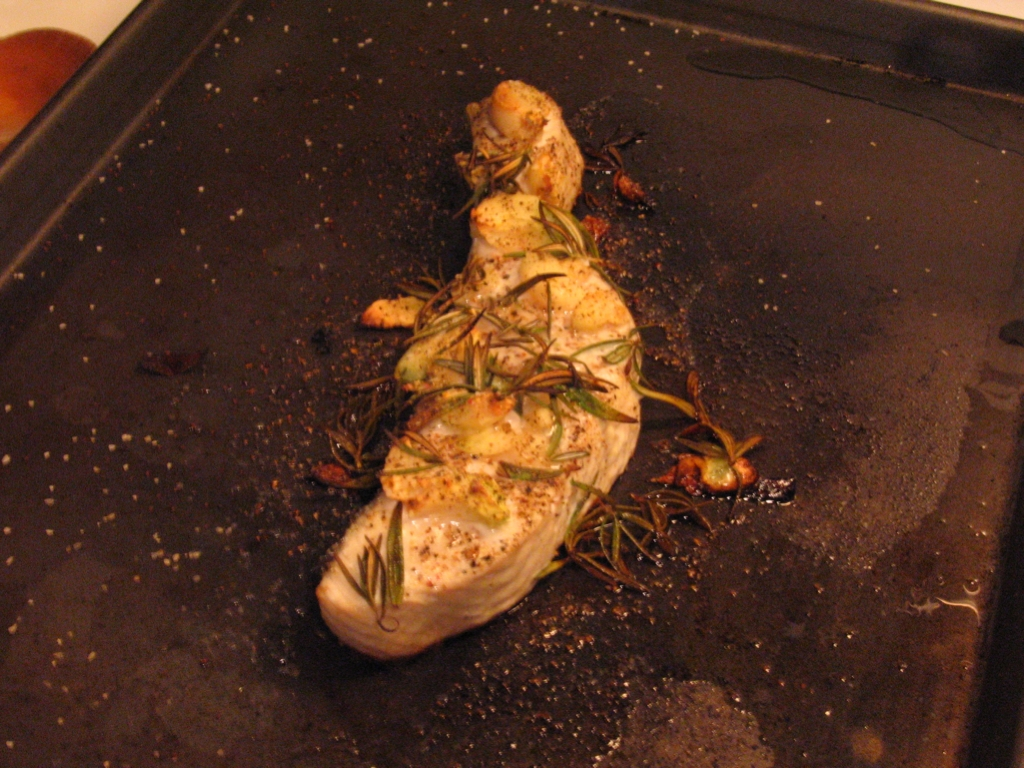 White Alaskan Salmon